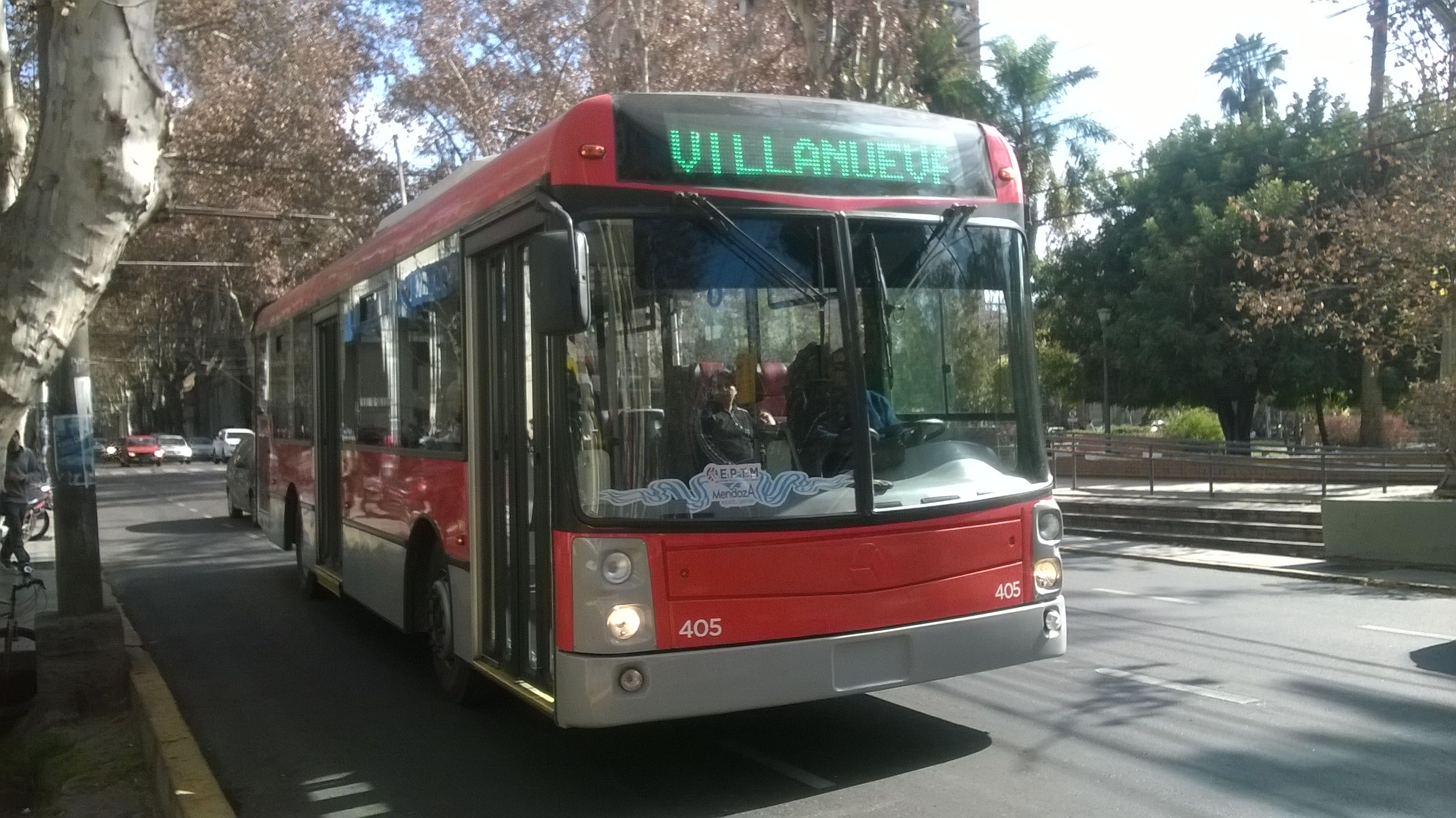 Nuevo trole de la linea Villanueva en Mendoza